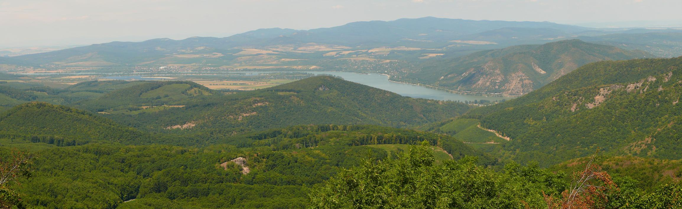 Danube Bend from Dobogó-kő (Visegrád Hills) Kilátás a Dobogó-kőről a Duna-kanyarra. Saját kép, készült 2007. július.